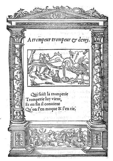 Gilles Corrozet, Les fables du très ancien Ésope, Paris, 1542. Illustration de la fable d'Ésope «La cigogne et le renard» Disponible sur